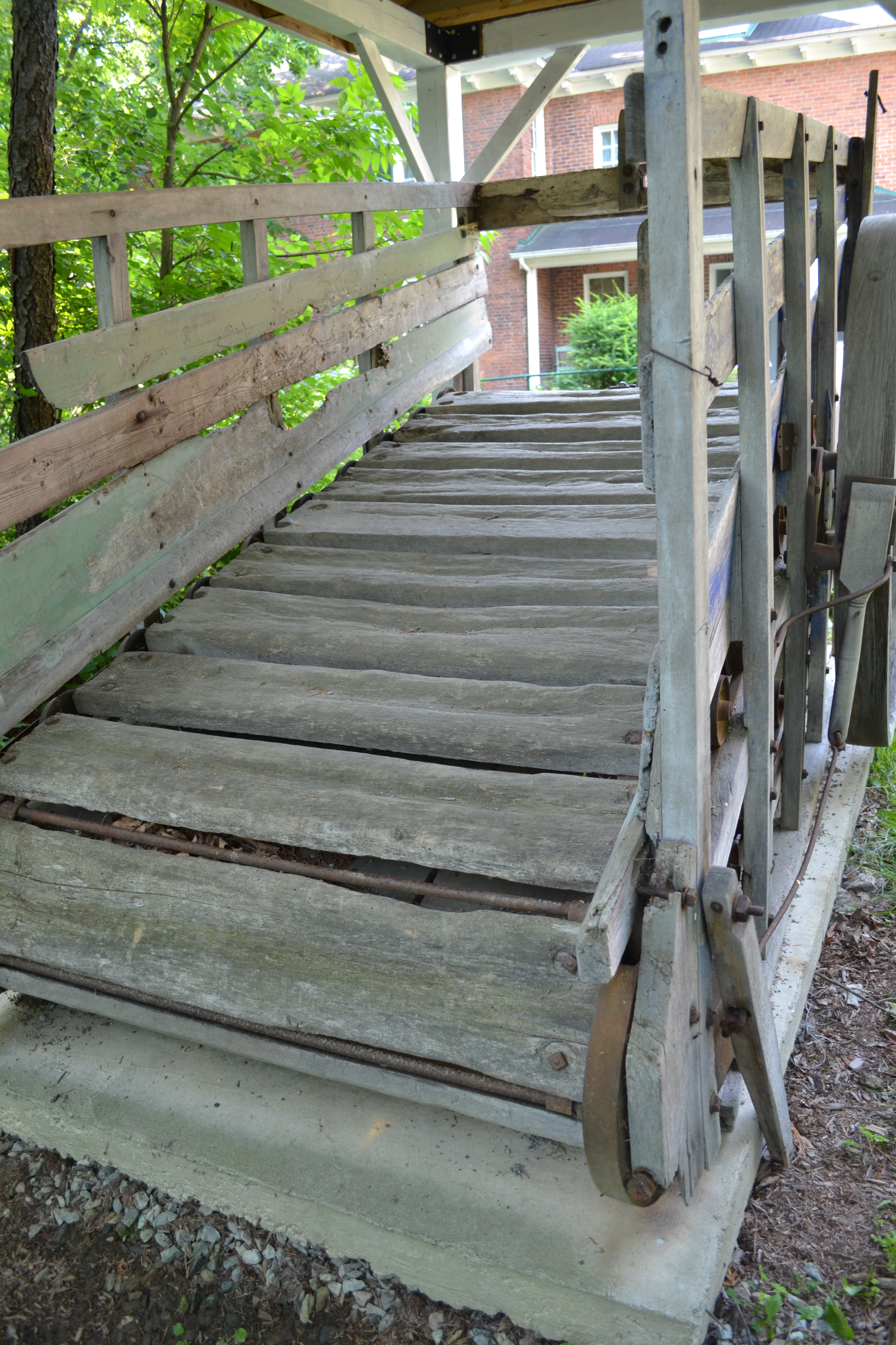 Trépigneuse du Centre culturel et du patrimoine Uplands dans l'arrondissement de Lennoxville à Sherbrooke, Québec.